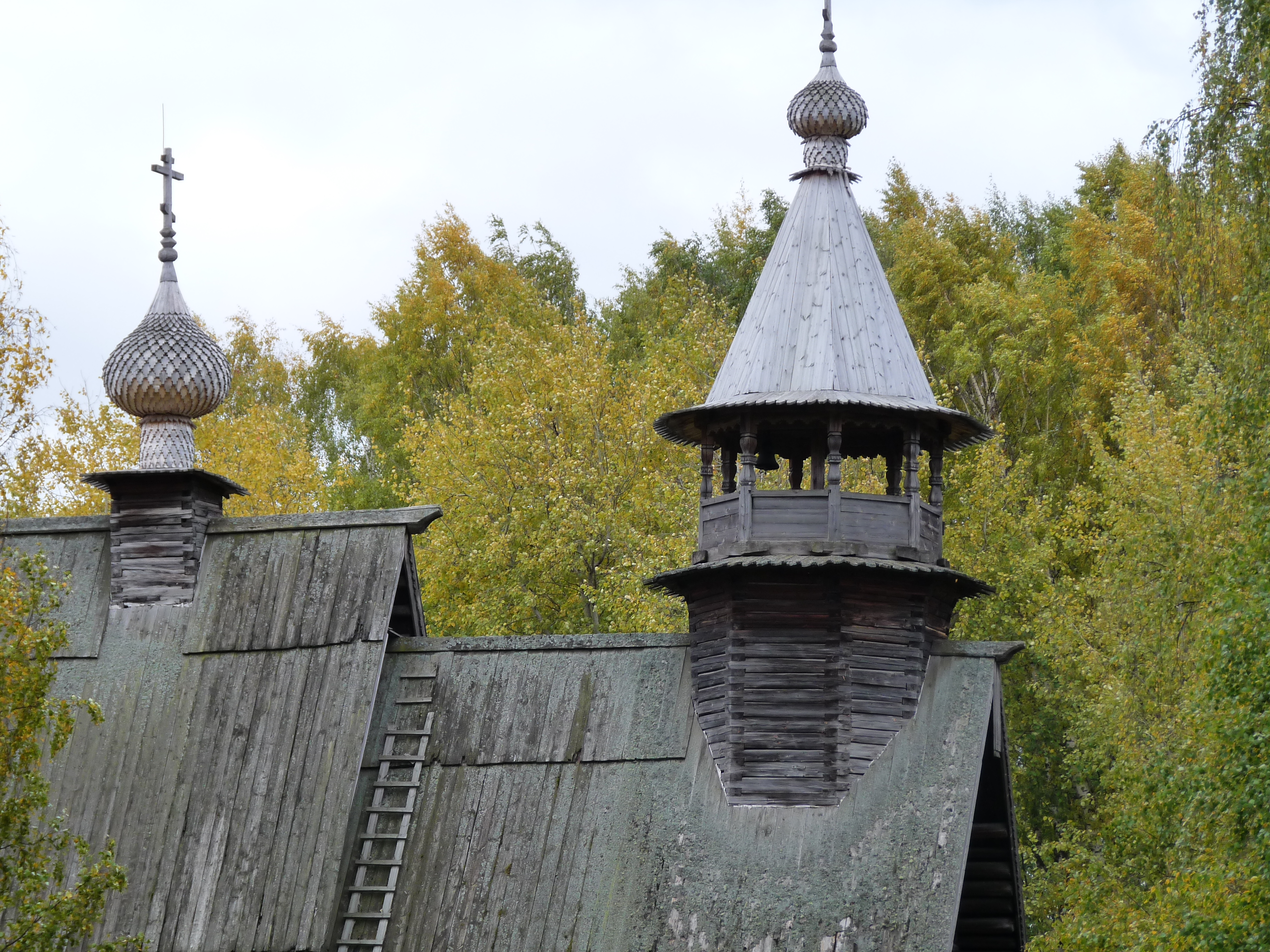 Kostroma Museum